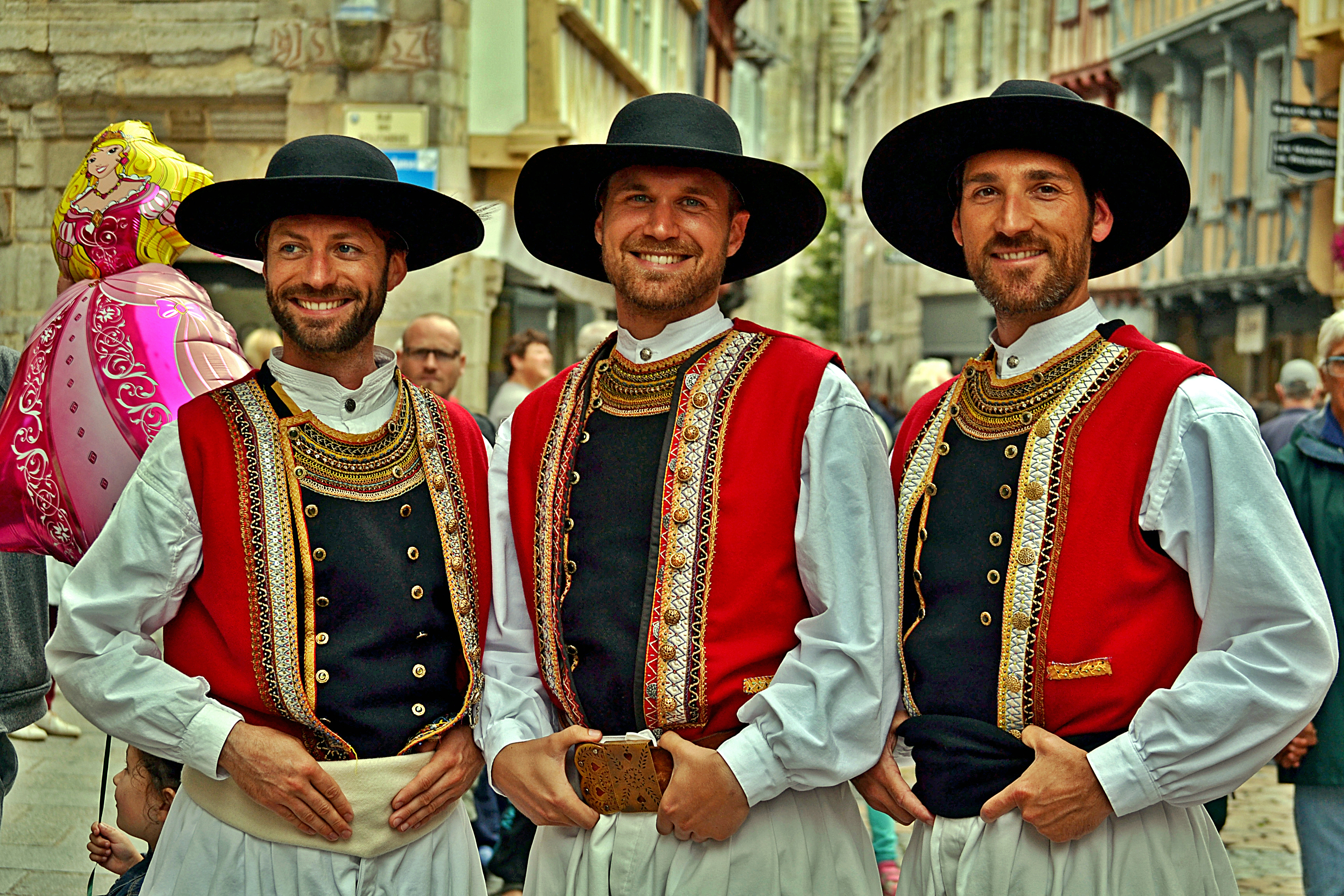 Kemper en Fête, danseurs en costume dans les rues de Quimper pour le festival de Cornouaille le 26 juillet 2015.